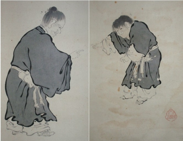 Tuschzeichnung von Shôkadô